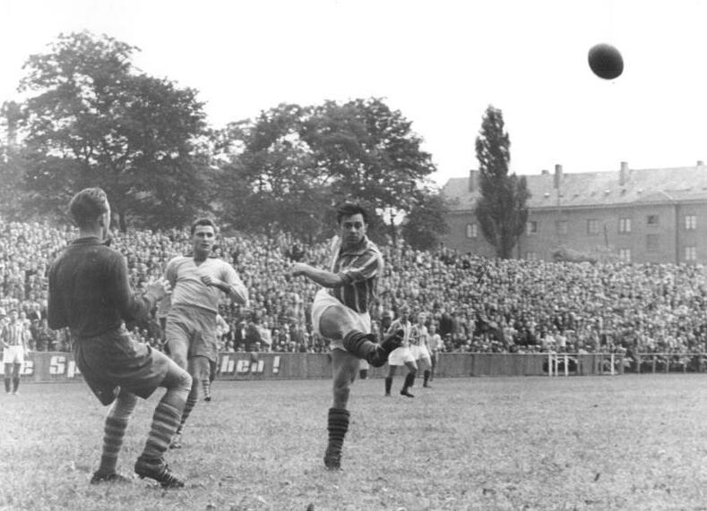 Zentralbild-Schlegel Bey-Noa 23.8.1957 Fußball-Rückrunde begann - Die zweite Serie der Fußball-Punktspiele der Oberliga begann bereits am Donnerstag, dem 22.8.1957, in Karl-Marx-Stadt mit dem Treffen zwischen dem SC Motor und ASK Vorwärts Berlin. Der Tabellenführer Vorwärts kam bei strömenden Regen im Dr. Kurt-Fischer-Stadion nur zu einem 2:2-Unentschieden. UBz: Der Karl-Marx-Städter Verteidiger Loh (rechts) klärt vor dem Berliner Stürmer Fritzsche (Mitte). Der Motor-Torwart Schleussner (links) braucht nicht mehr einzugreifen.